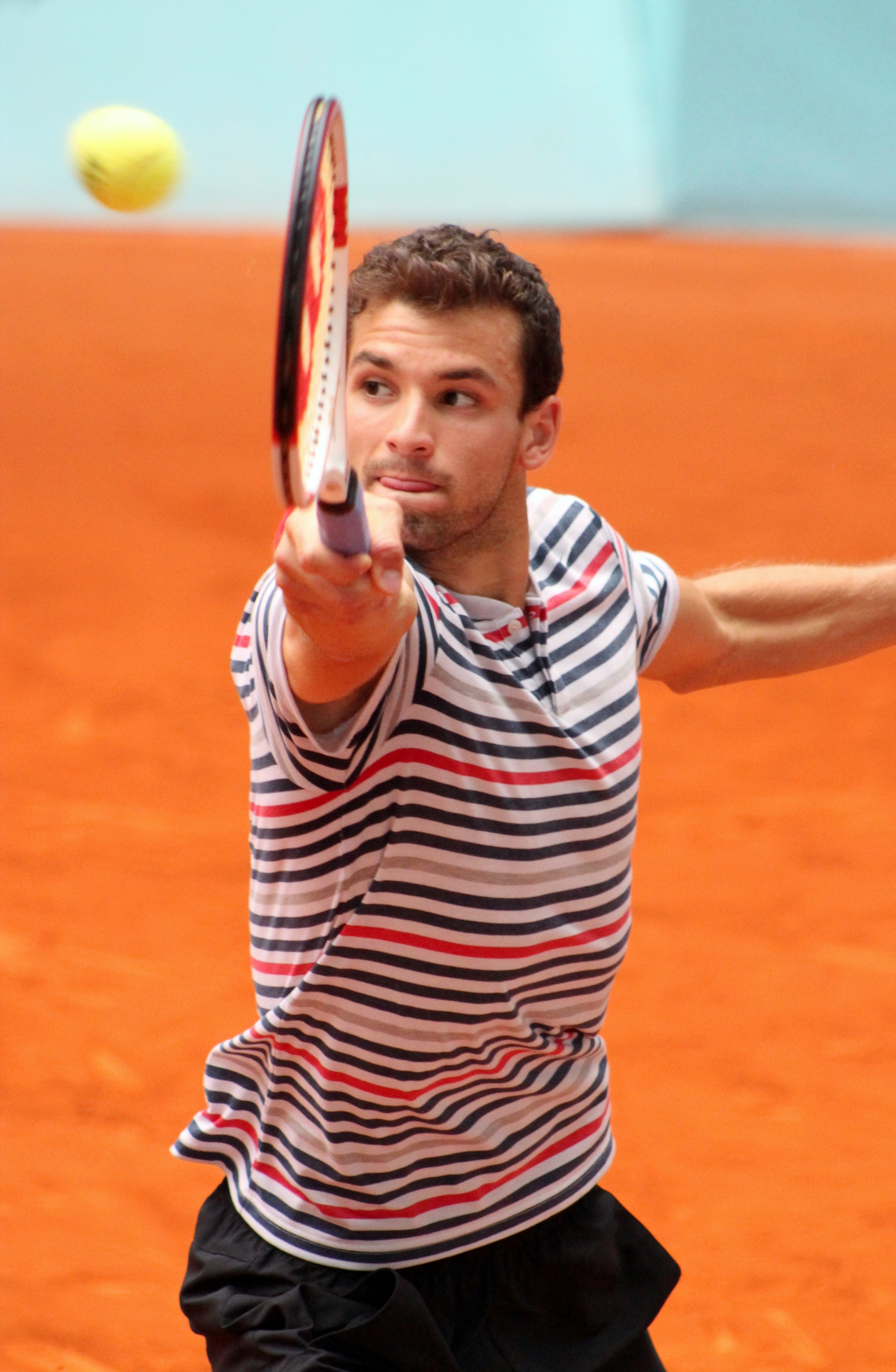 Dimitrov MA14 (28) - Copy